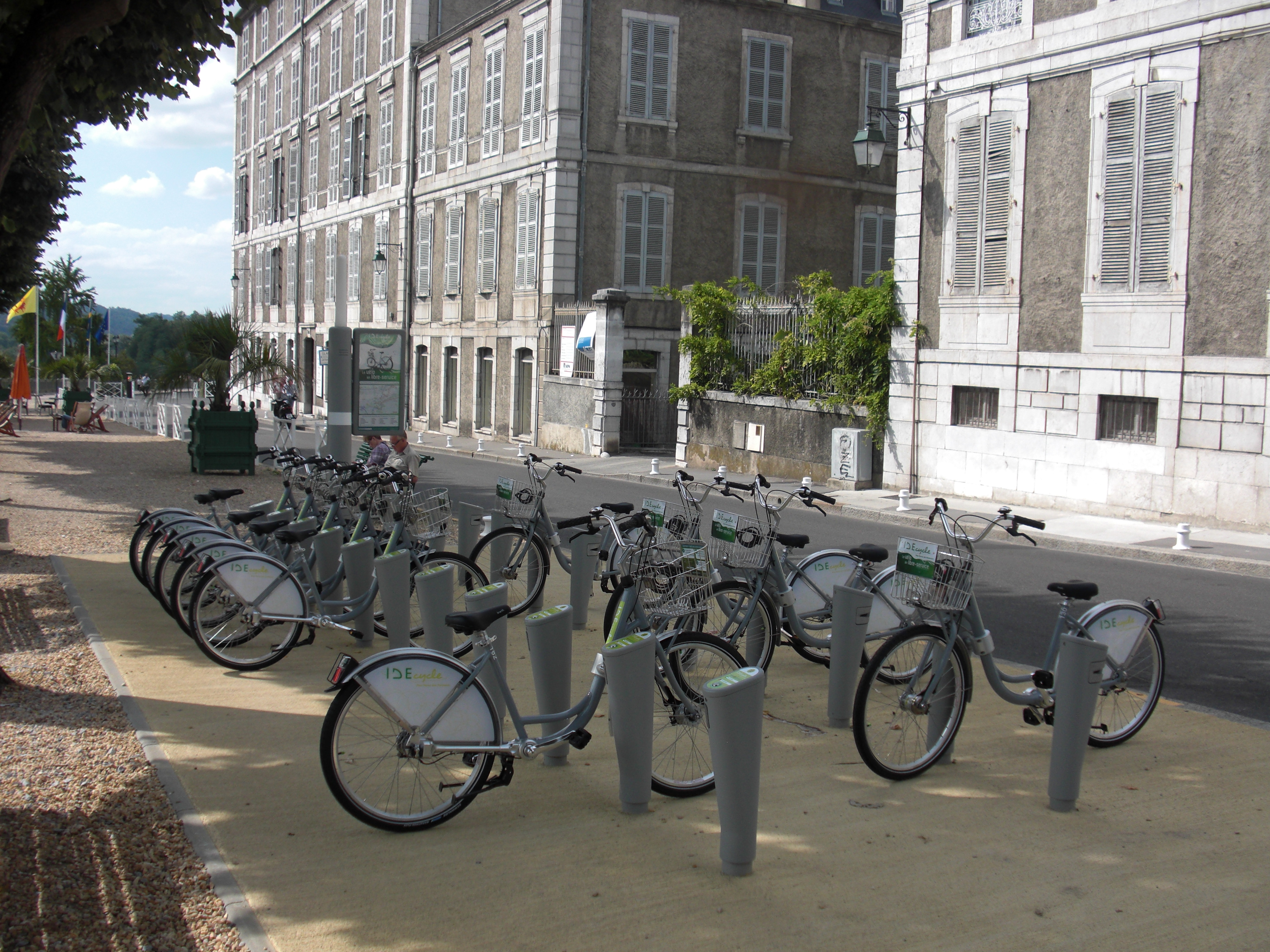 Photo de la station Funiculaire IDEcycle du réseau IDELIS